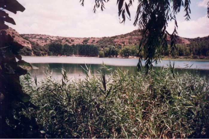 Fotografía realizada por Josemanuel